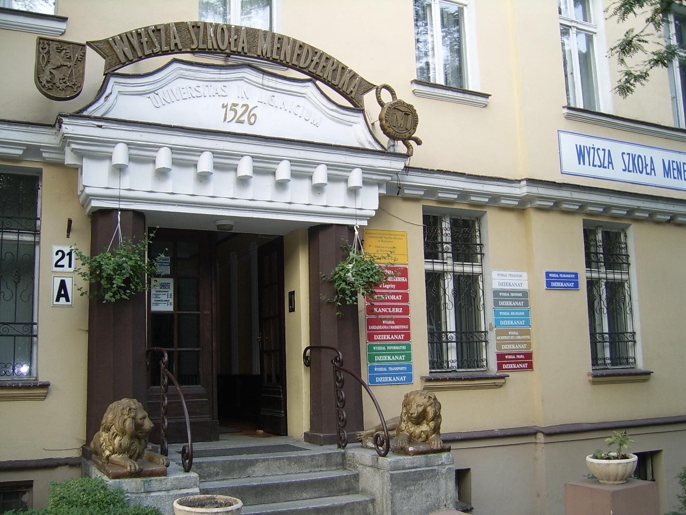 Siedziba uczelni Wyższej Szkoły Menedżerskiej w Legnicy przy ul. Reymonta 21 (24.07.2006r). Autor: T. Juraszek